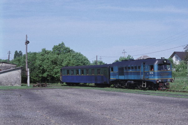 TU2-034 in Silze